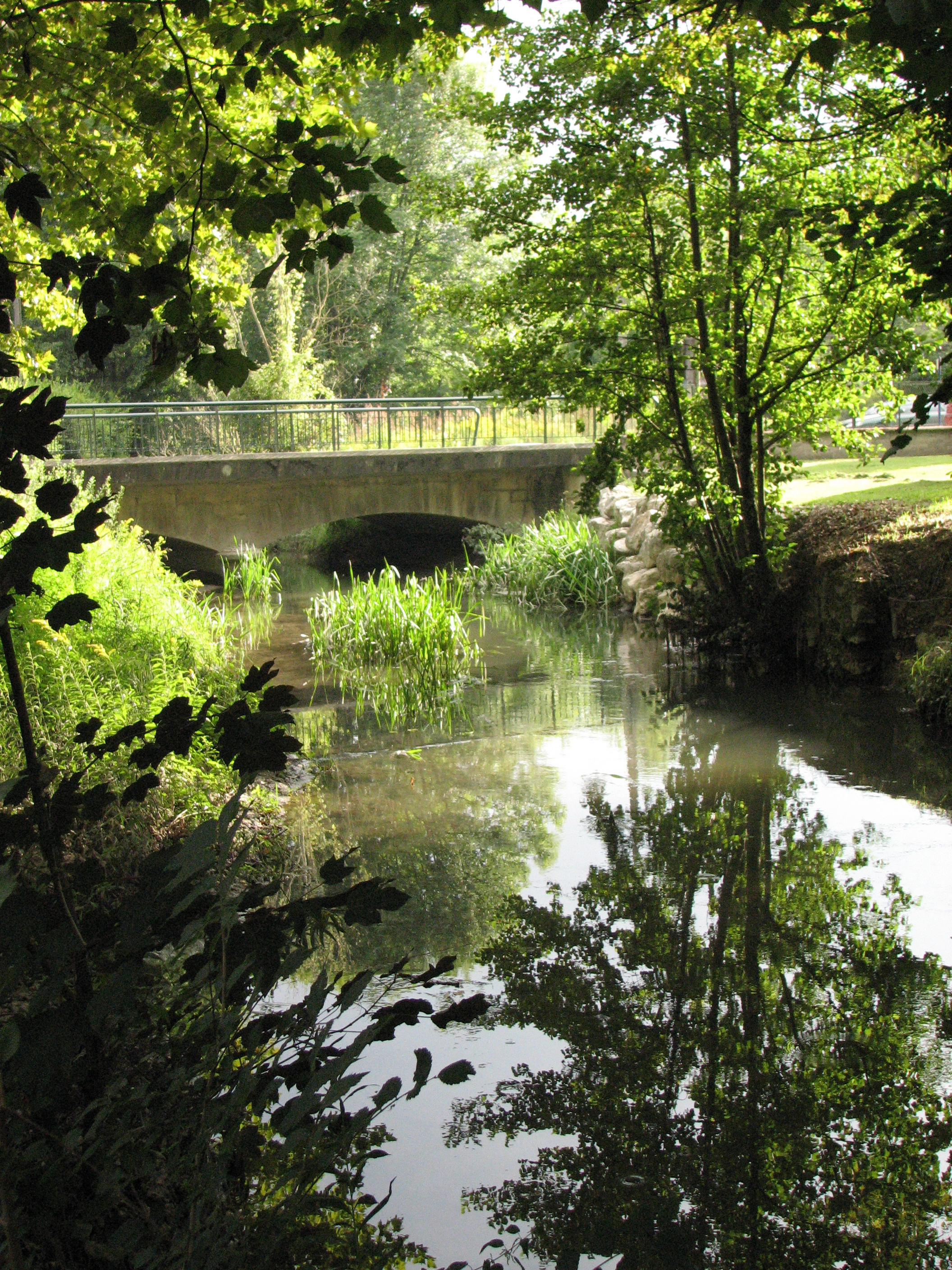 La Bièvre à Saint-Didier d'Aoste (Isère).